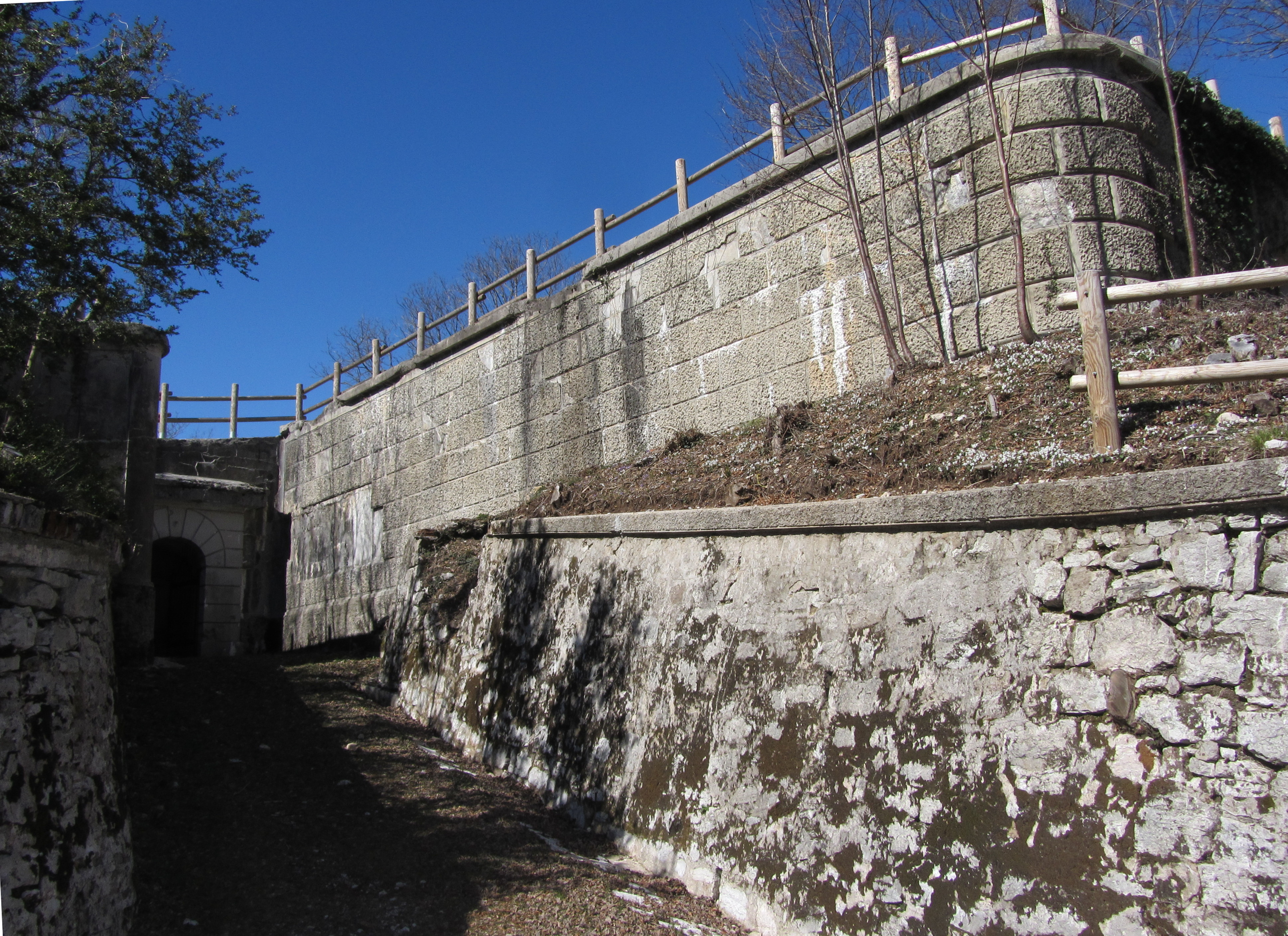 Forte di Monte Ercole Ospedaletto di Gemona (UDINE) - ITALY - Ingresso alle batterie